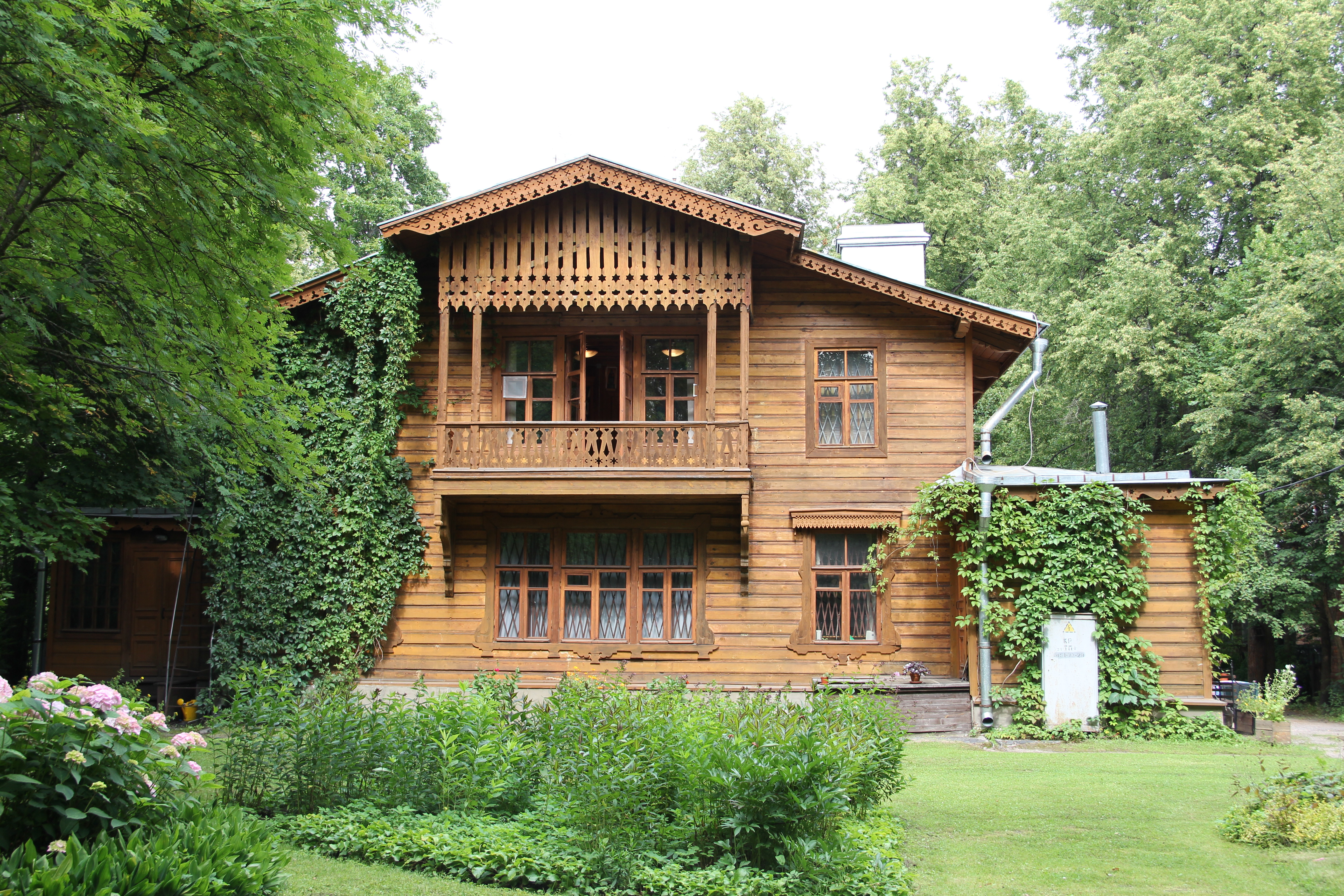 Дом, в котором жил и умер Чистяков П.П., русский художник и педагог: Московское шоссе, 23, (собственный дом), Пушкин, Пушкинский район, Санкт-Петербург